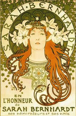 Sarah_Bernhardt_Mucha.jpg: Афіша з портретом Сари Бернар. Кольорова літографія.